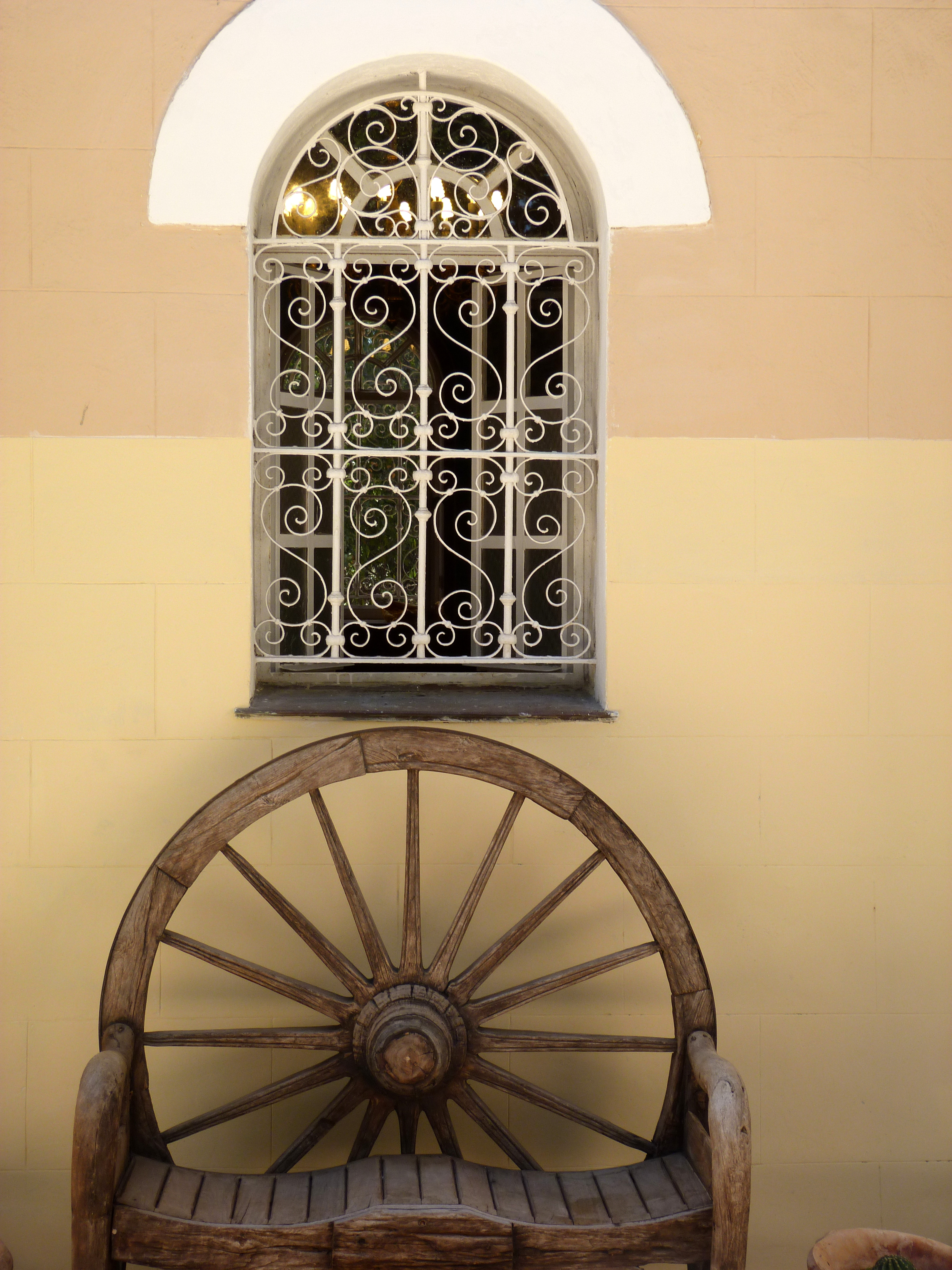 הכנסייה הפרובוסלבית במרכז הכרמל בחיפה